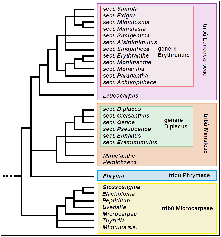 Cladogramma del genere Mimulus dopo la revisione filogenetica